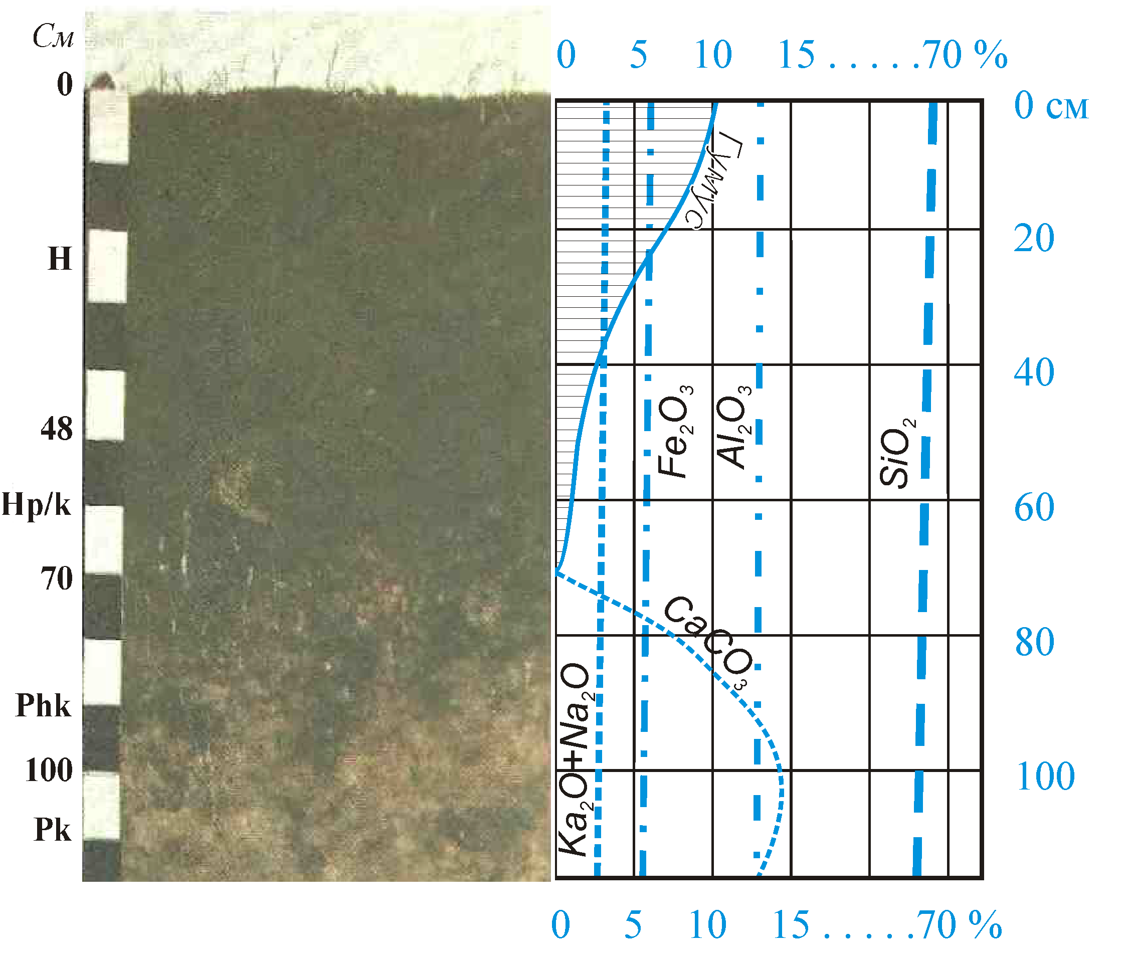 Схематичний графік перерозподілу продуктів ґрунтотворення у профілі чорнозему звичайного